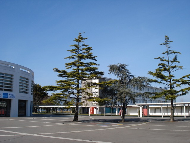 Une partie du coeur de la Cité scolaire de St Nazaire. On aperçoit les modèles réduits des cheminées de quelques bateaux construits aux chantiers navals de Saint-Nazaire.